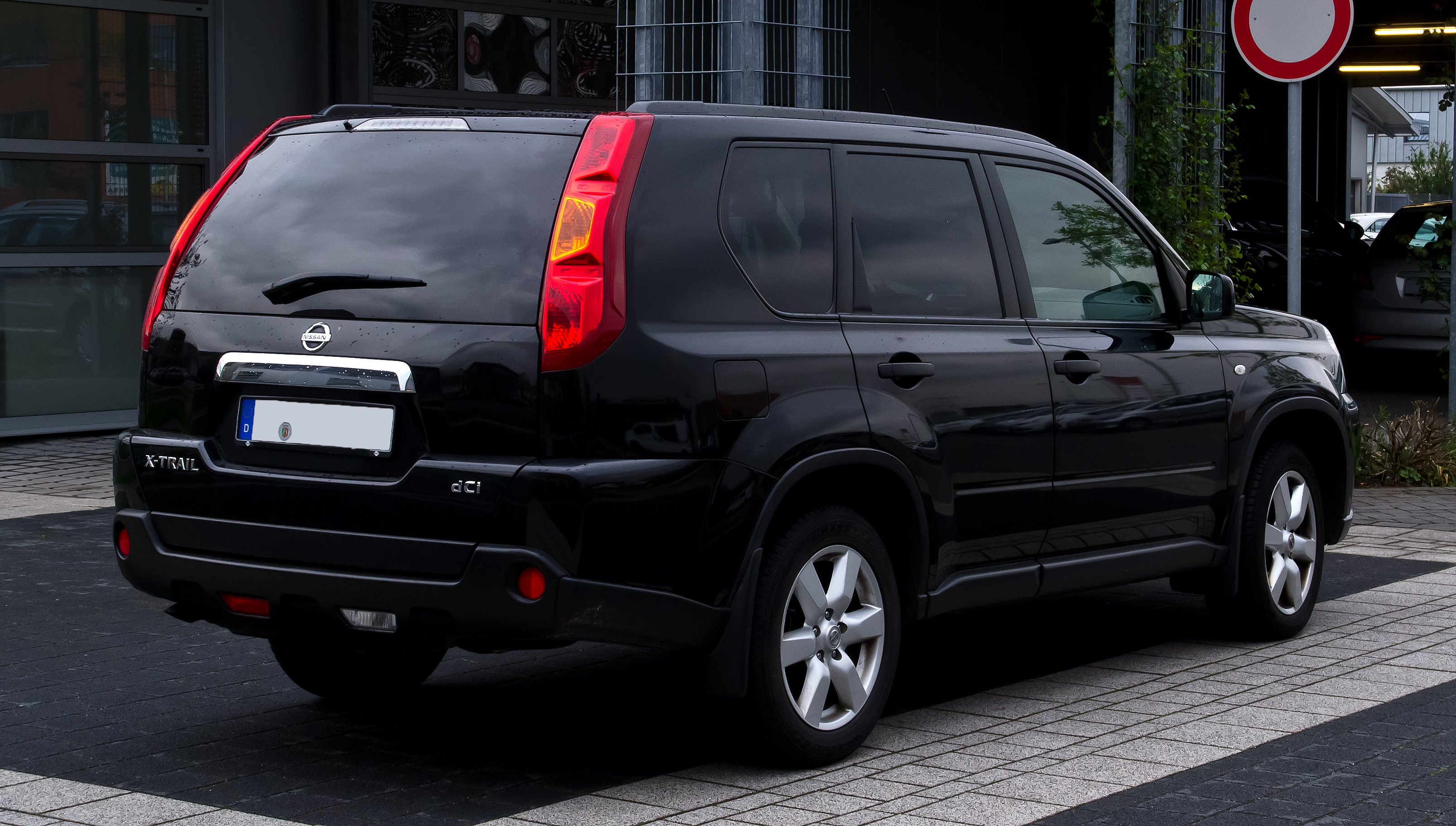 Nissan X-Trail 2.0 dCi 4x4 (T31)